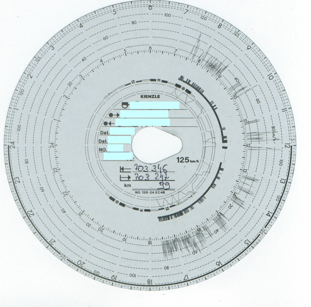 Disque de chronotachygraphe rempli.